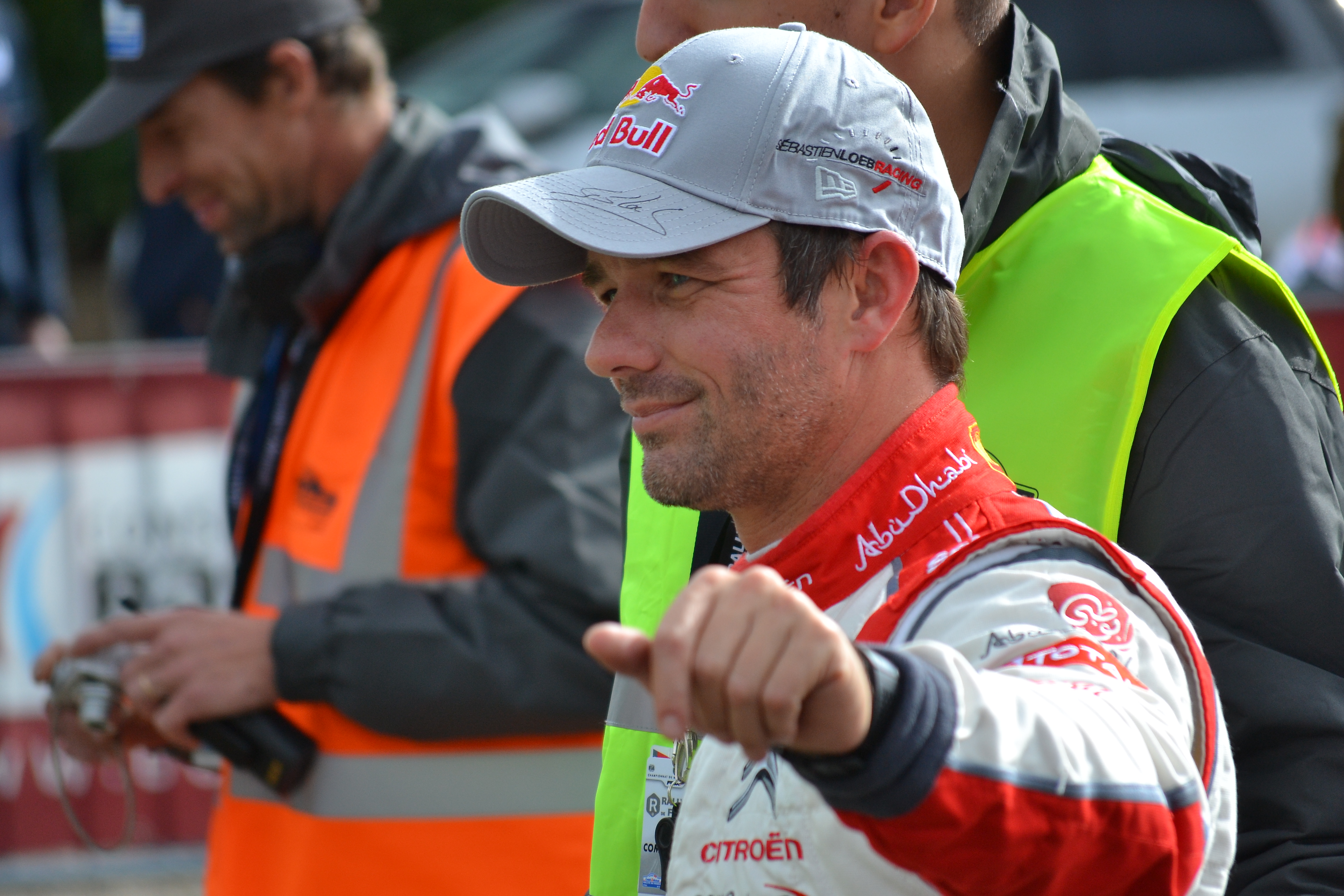 Sébastien Loeb au parc d'assistance de Colmar durant le Rallye de France-Alsace 2013.